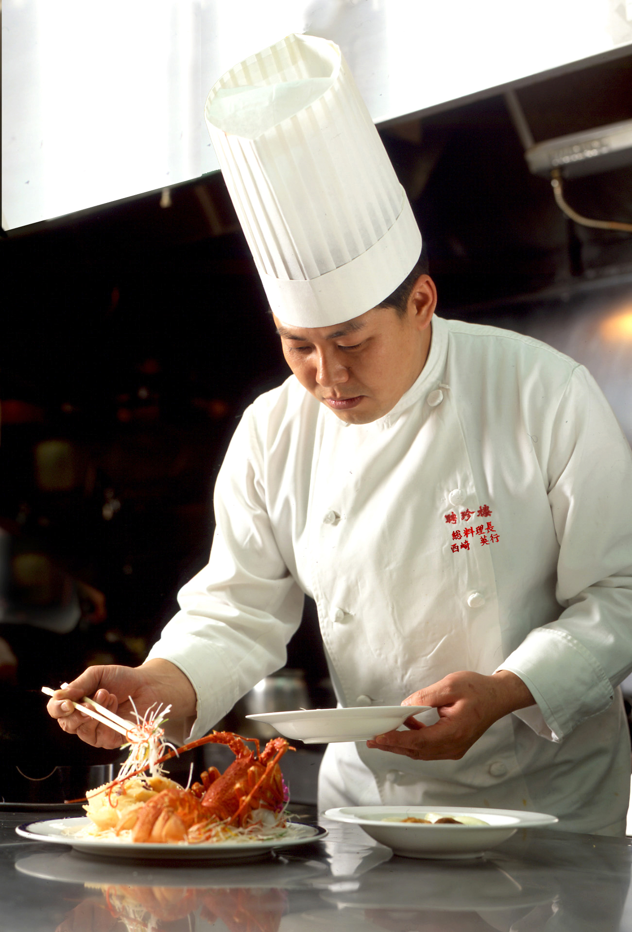 聘珍樓が撮影致しました。